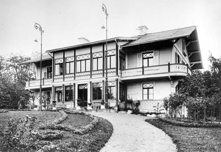 Kallhälls gård, Järfälla, 1907. Huvudbyggnaden från baksidan (sjösidan).